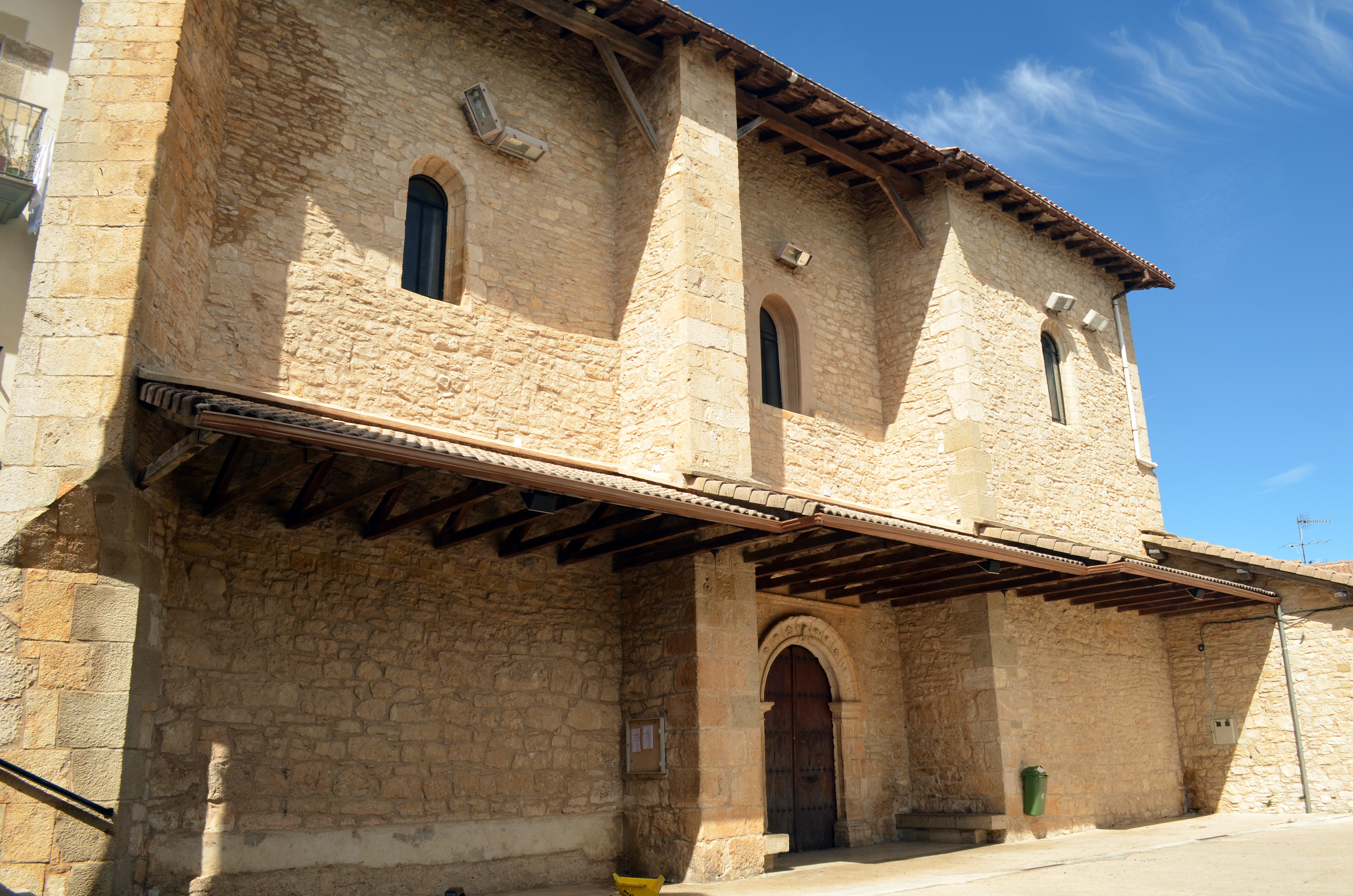 Iglesia de San Pedro, desde el frontón en el lado sur, de Lezáun (Navarra, España)